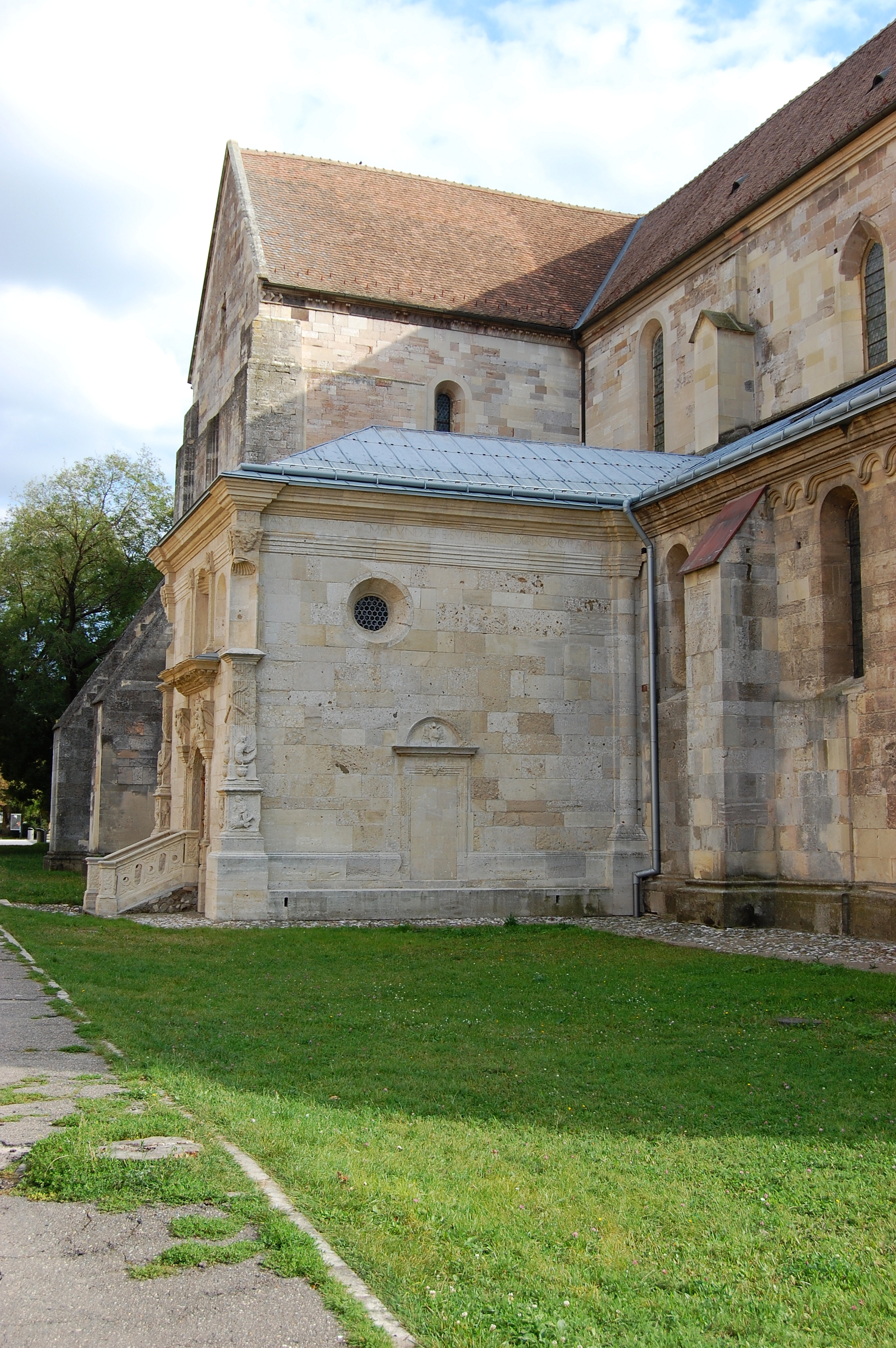 Gyulafehérvár, Szent Mihály Székesegyház - XI.-XIII. sz. - Lászay kápolna - XVI. sz. eleje